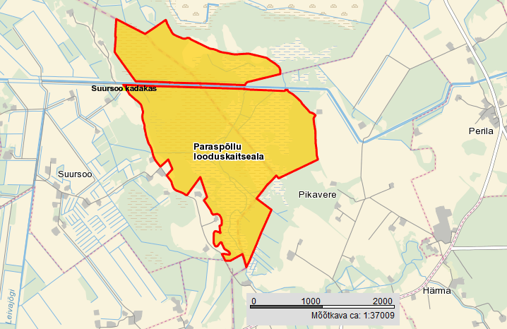 Paraspõllu LKA kaart. Põhineb Maa-ameti kaardil.